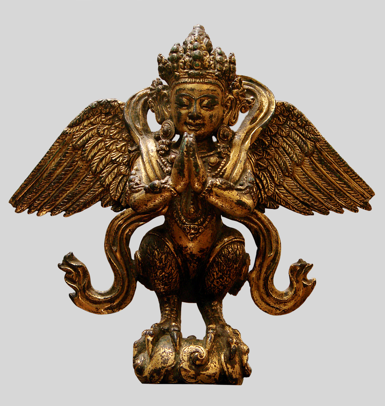 Kinnara, Chine, laiton doré, règne de l'empereur Xuande (1426-1435). Musée Guimet à Paris.